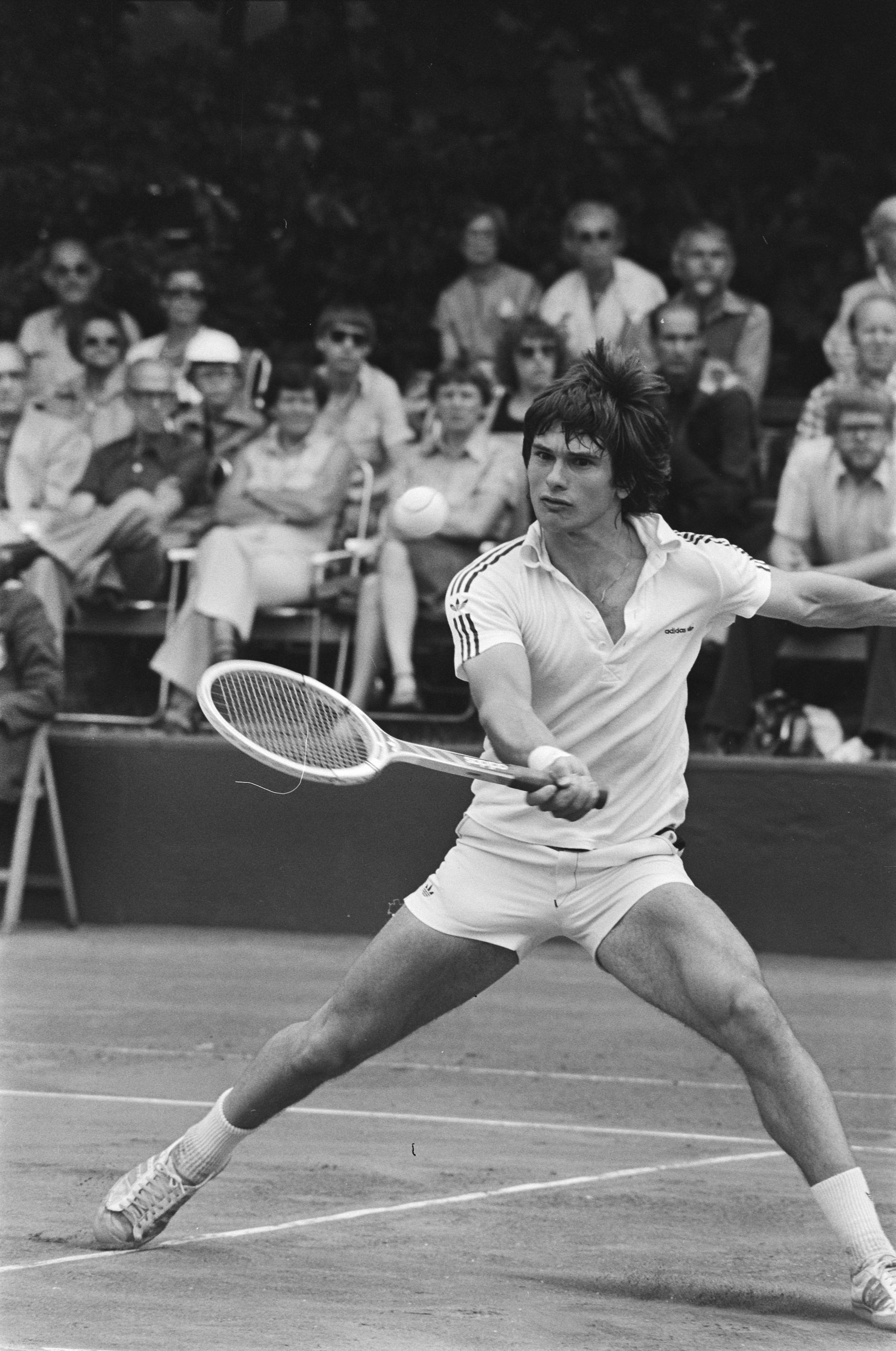 Collectie / Archief : Fotocollectie Anefo Reportage / Serie : [ onbekend ] Beschrijving : Tennis Het Melkhuisje ; Peter Elter in actie Datum : 27 juli 1978 Trefwoorden : TENNIS Persoonsnaam : Het Melkhuisje Fotograaf : Verhoeff, Bert / Anefo Auteursrechthebbende : Nationaal Archief Materiaalsoort : Negatief (zwart/wit) Nummer archiefinventaris : bekijk toegang 2.24.01.05 Bestanddeelnummer : 929-8365